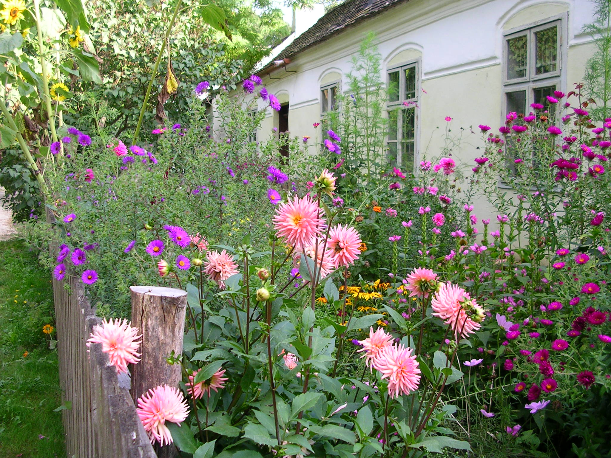 Blick in den sommerlich bepflanten Garten des Sattlerhauses im Museumsdorf Niedersulz. Typisch für diese Bepflanzung sind die verschiedenen Daliensorten.